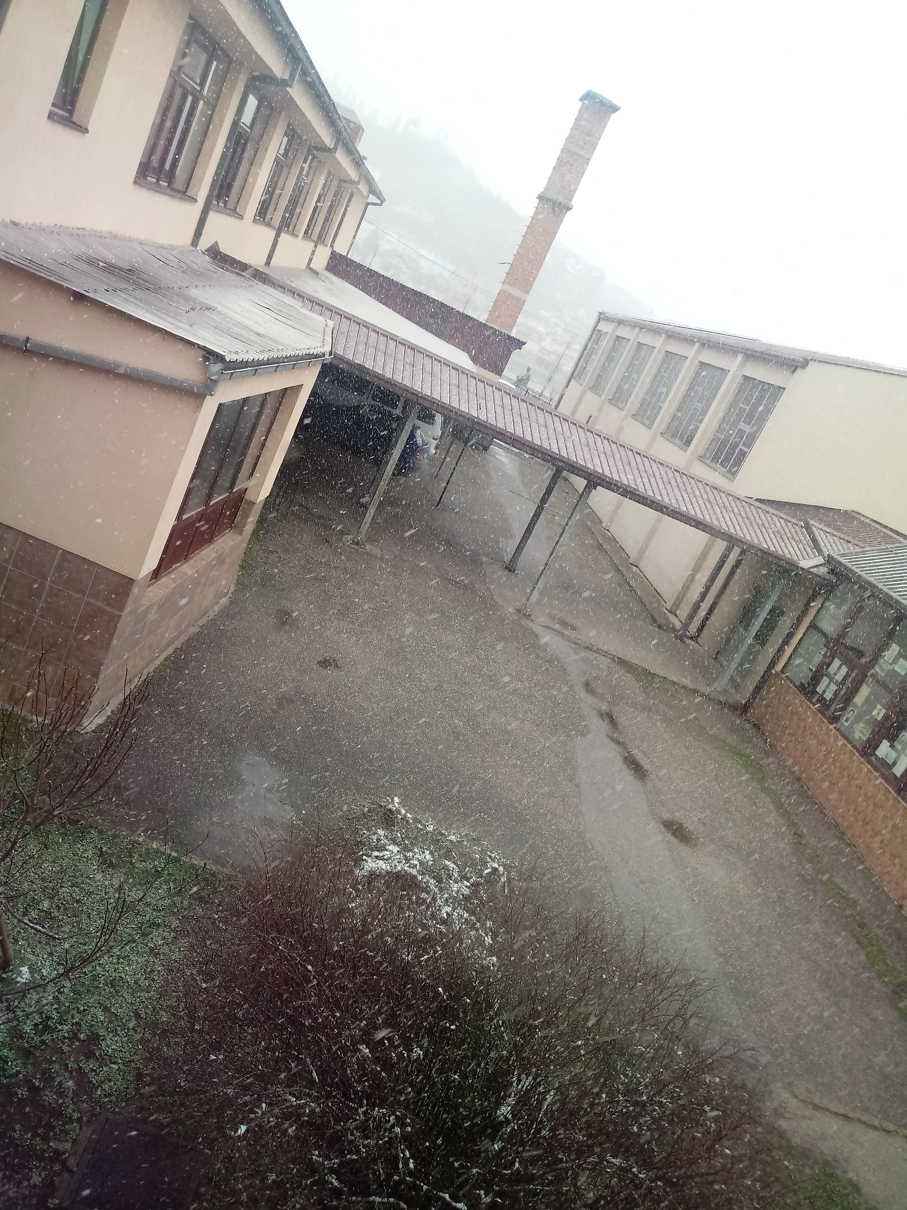 Српски (ћирилица): Јавна Установа Средњошколски центар "Иво Андрић"